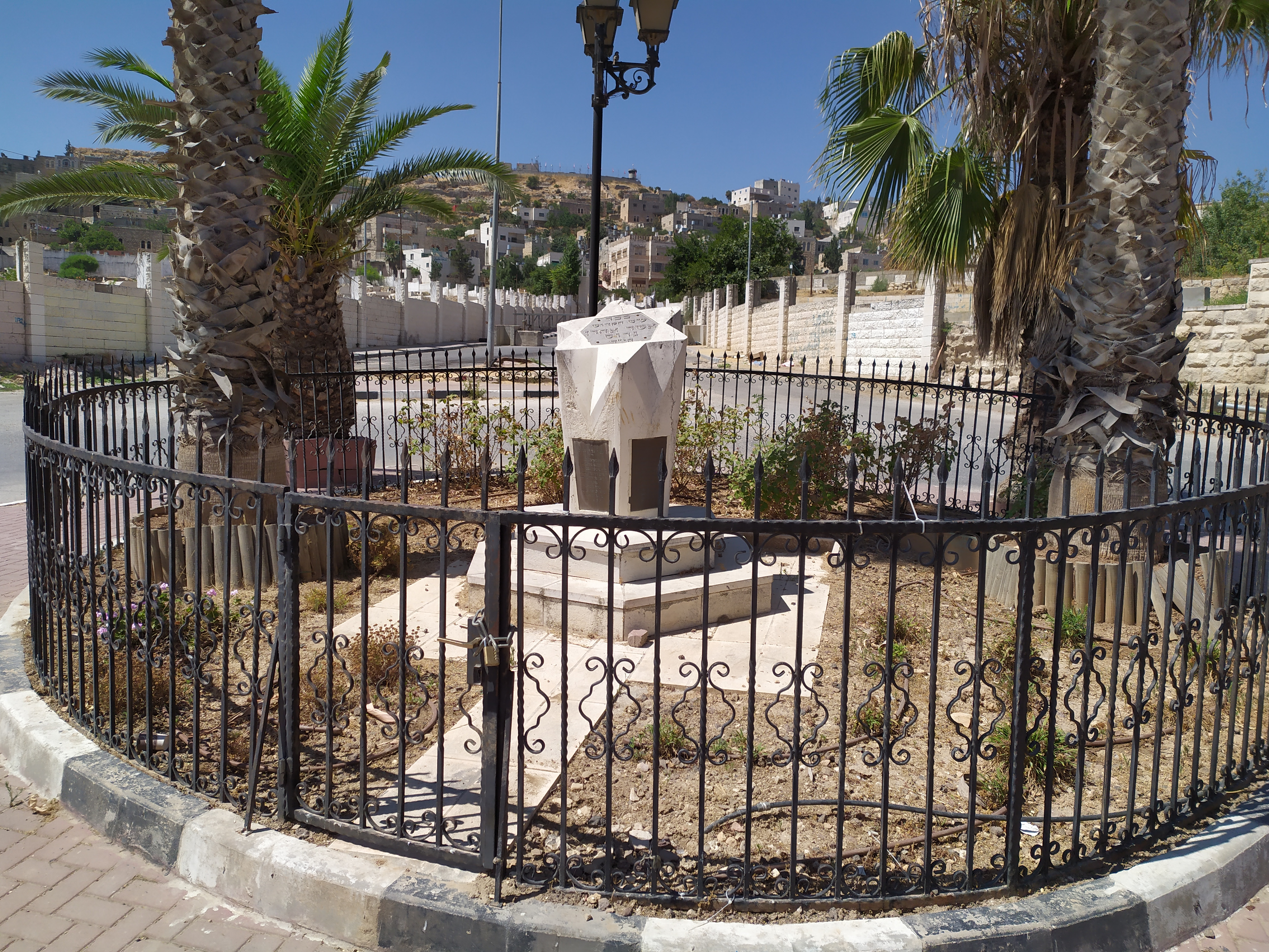 כיכר גרוס בחברון: subst:PAGENAME subst:#if:| {2 }: subst:PAGENAME | subst:#if:| {3 }: subst:PAGENAME | subst:#if:| {4 }: subst:PAGENAME | subst:#if:| {5 }: subst:PAGENAME | subst:#if:| {6 }: subst:PAGENAME | subst:#if:| {7 }: subst:PAGENAME | subst:#if:| {8 }: subst:PAGENAME | subst:#if:| {9 }: subst:PAGENAME | subst:#if:| {10 }: subst:PAGENAME